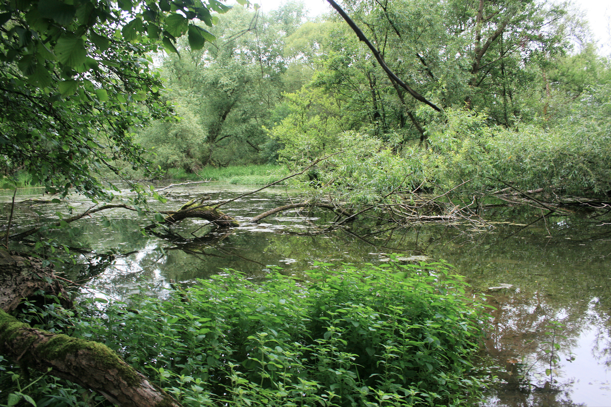 Dondorfer See